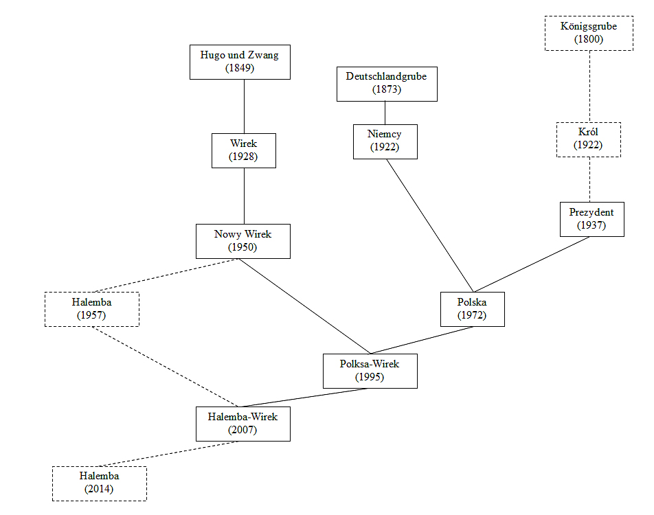 Vorgängerbergwerke und Fusionen des KWK Polska-Wirek